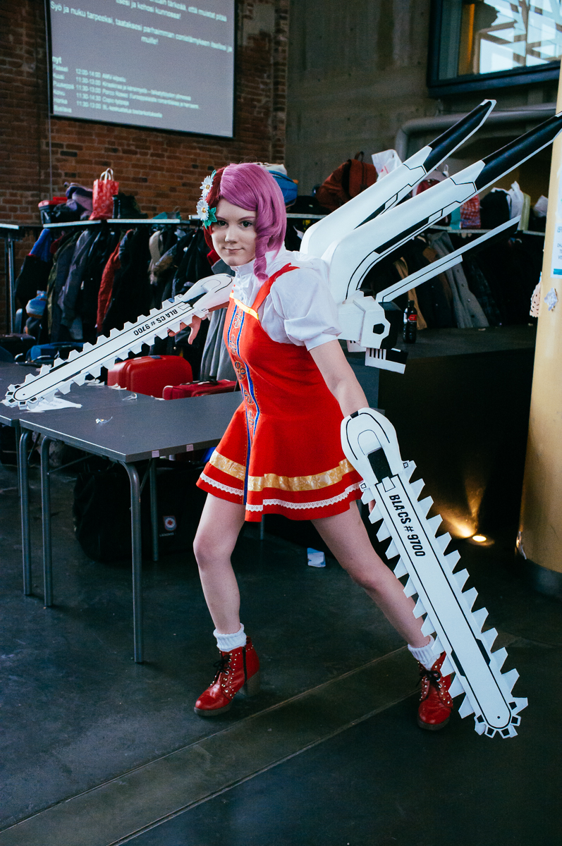 Desucon Frostbite 2014